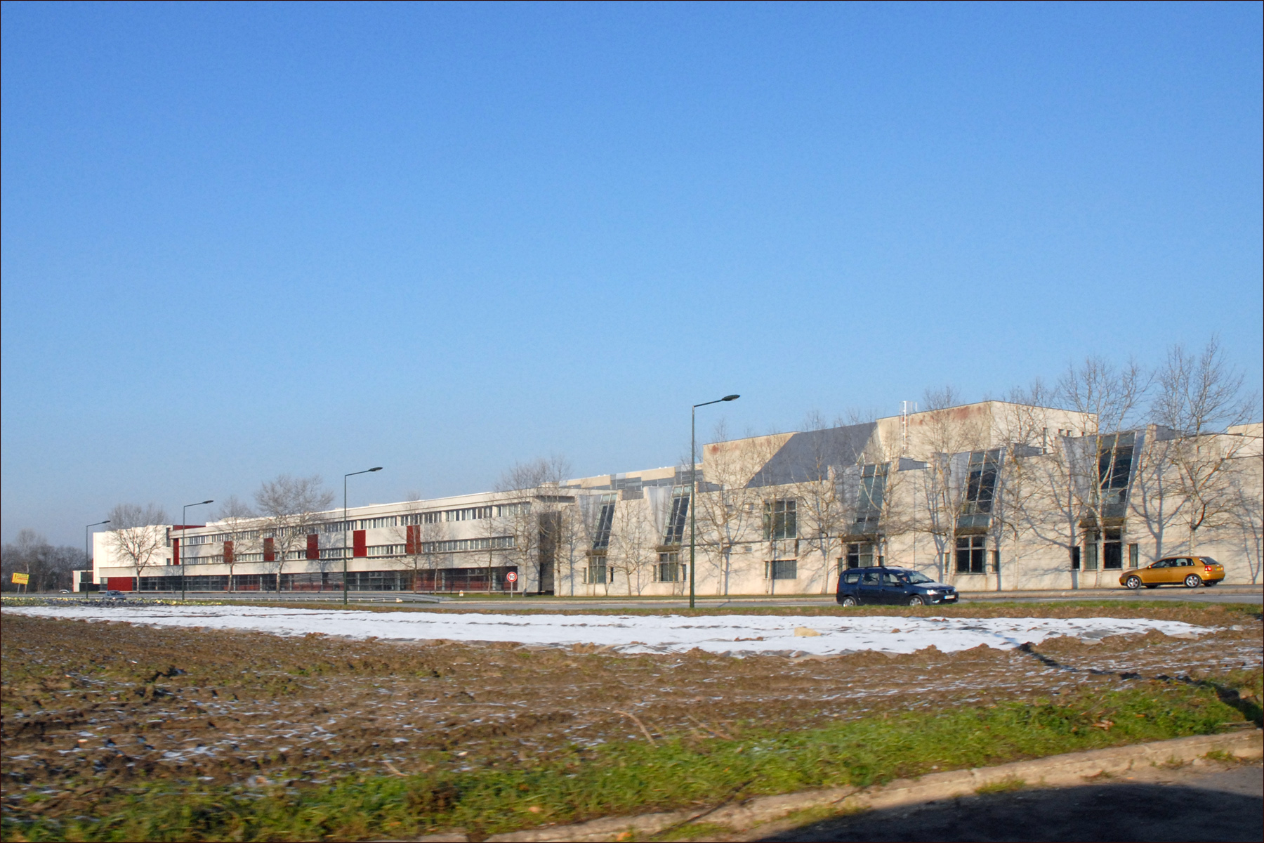 La Route Départementale 203 et les bâtiments universitaires du site de Neuville-sur-Oise. Le projet d'aménagement "Neuville Eco Campus" est piloté par la communauté d'agglomération de Cergy-Pontoise et par l'université de Cergy-Pontoise. Les laboratoires du site de Neuville de l'UCP sont les suivants : - UFR sciences et techniques - IUT génie biologique - IUT génie civil - IUT génie électrique et informatique industrielle